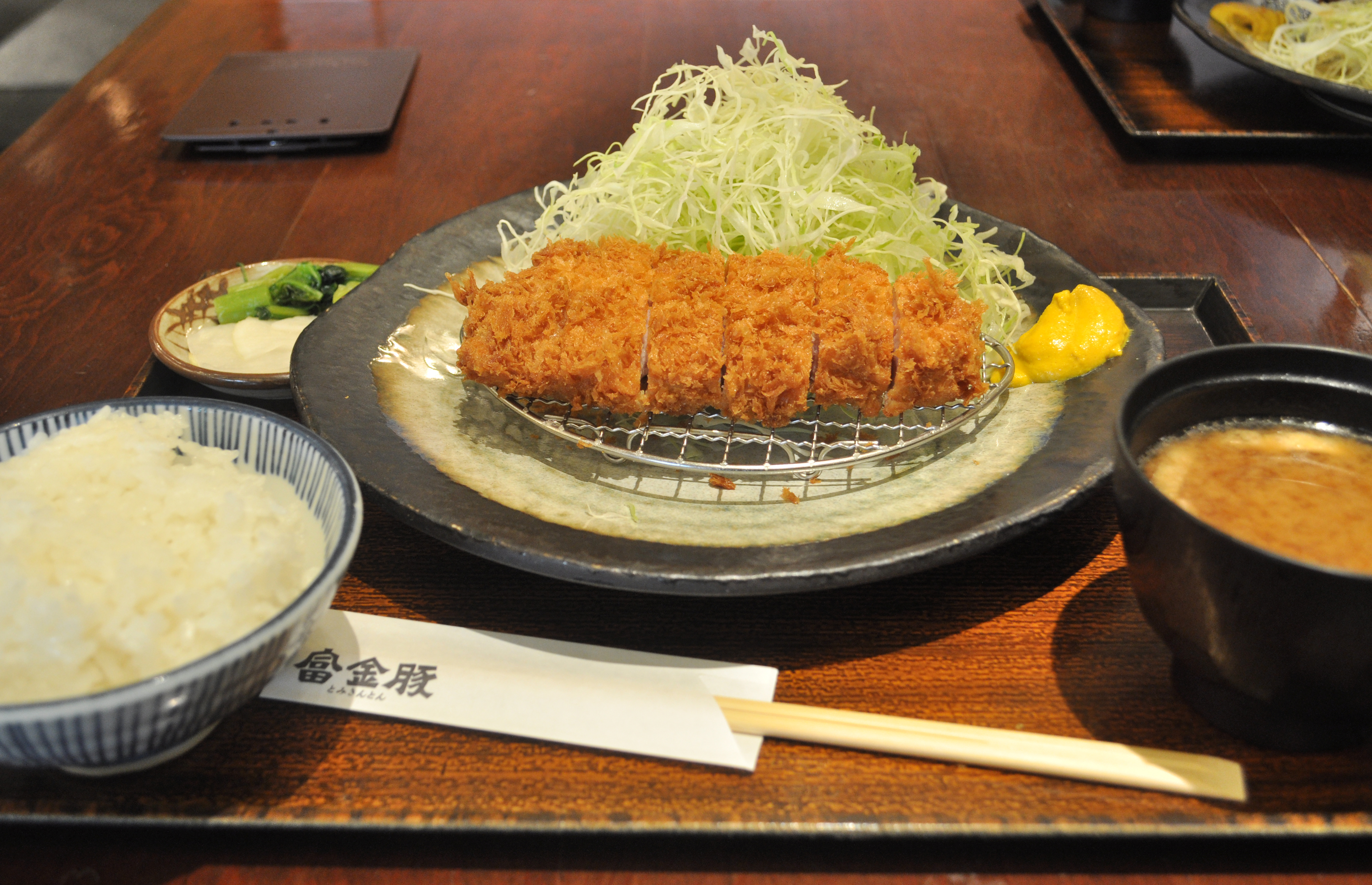 富金豚のロースとんかつ定食